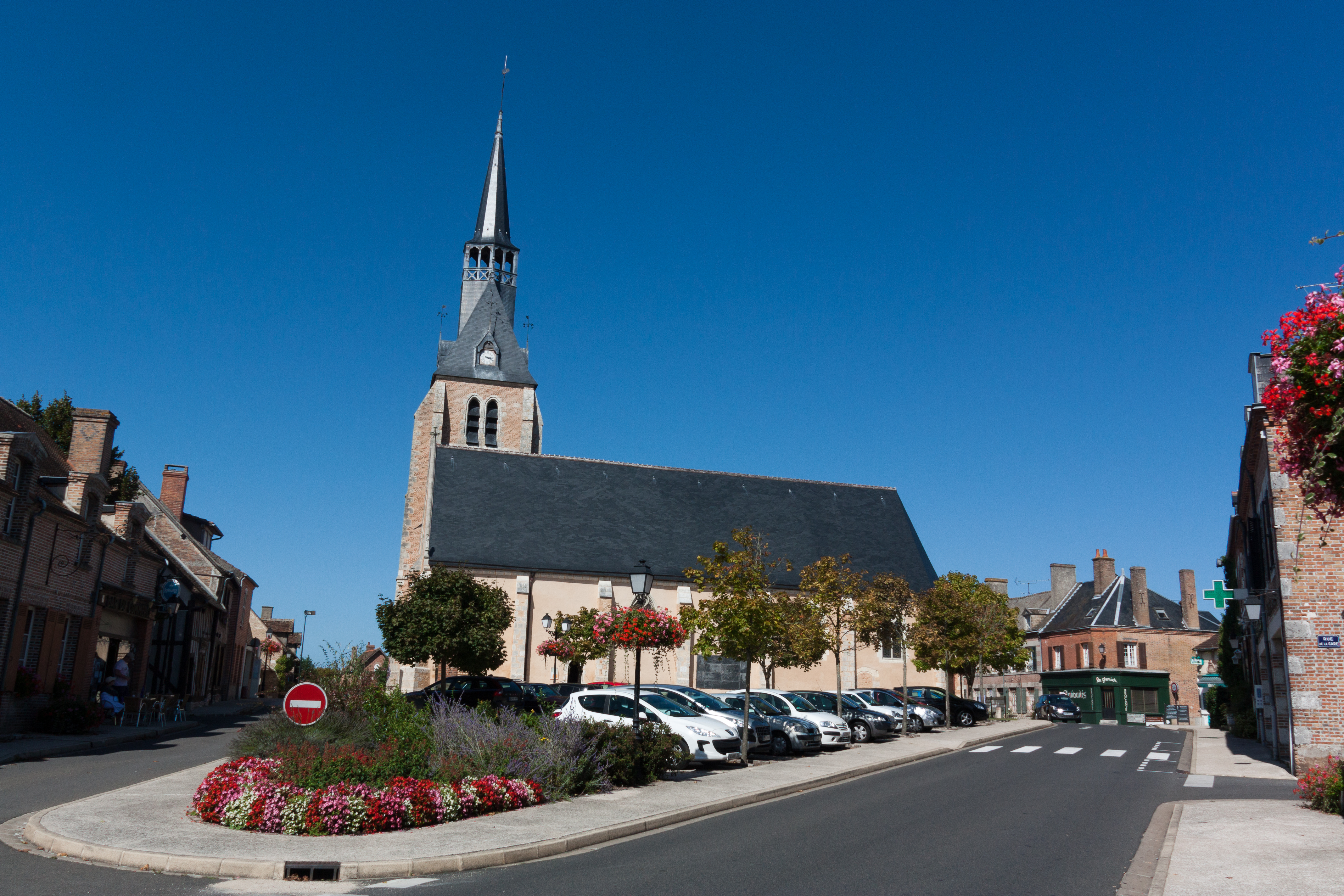 Église Saint-Étienne de Chaumont-sur-Tharonne - Chaumont-sur-Tharonne, Loir-et-Cher, France